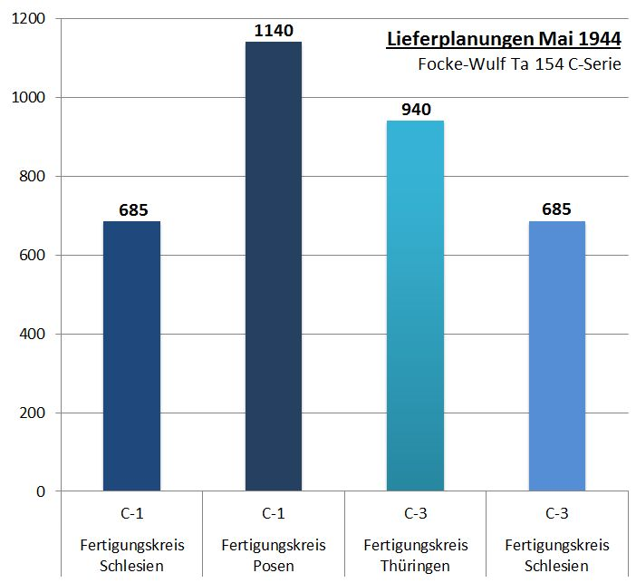 Produktipnsplanungen der Ta 154 C-Serie im Mai 1944